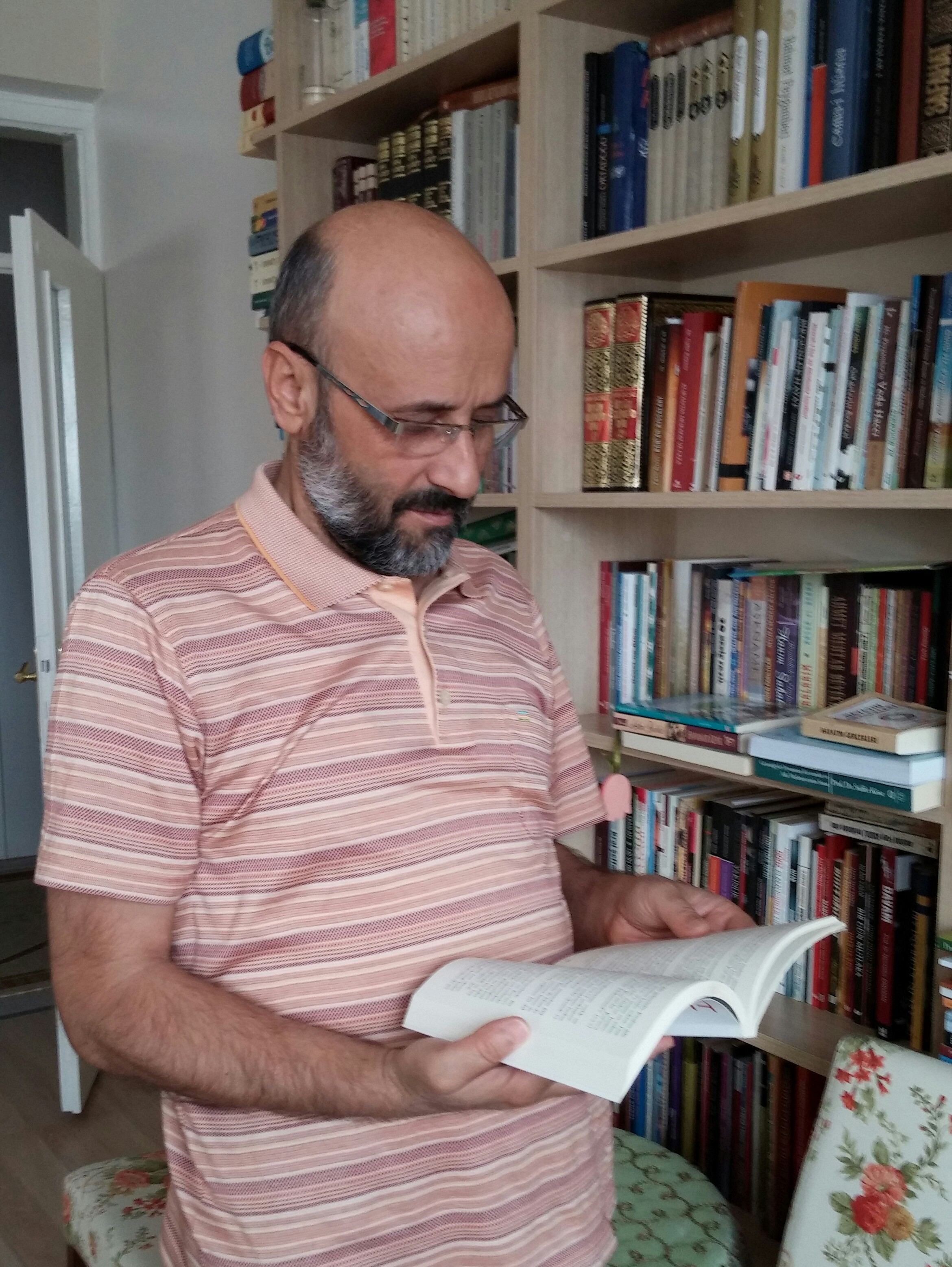 duran çetin kitap okuyor